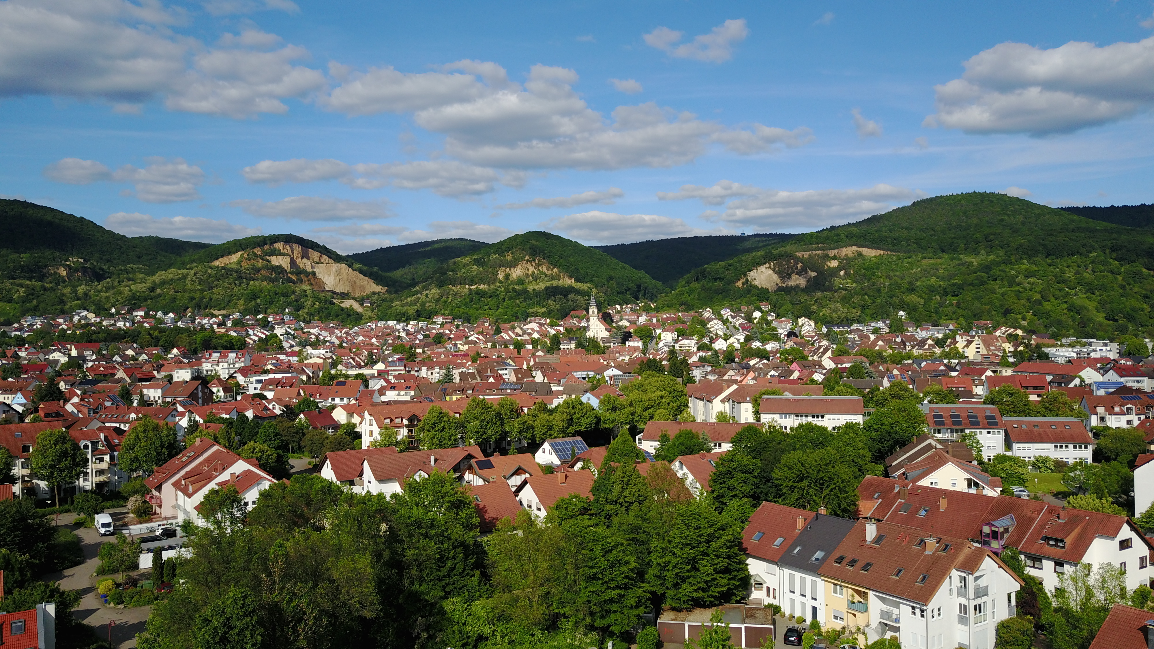 (von links nach rechts) Die Schauenburg, die 3 ehemaligen Steinbrüche Ölberg, Steinbruch Vadder, Steinbruch Leferenz und der Hohe Nistler (496 m). Dossenheim Luftbild von Westen.